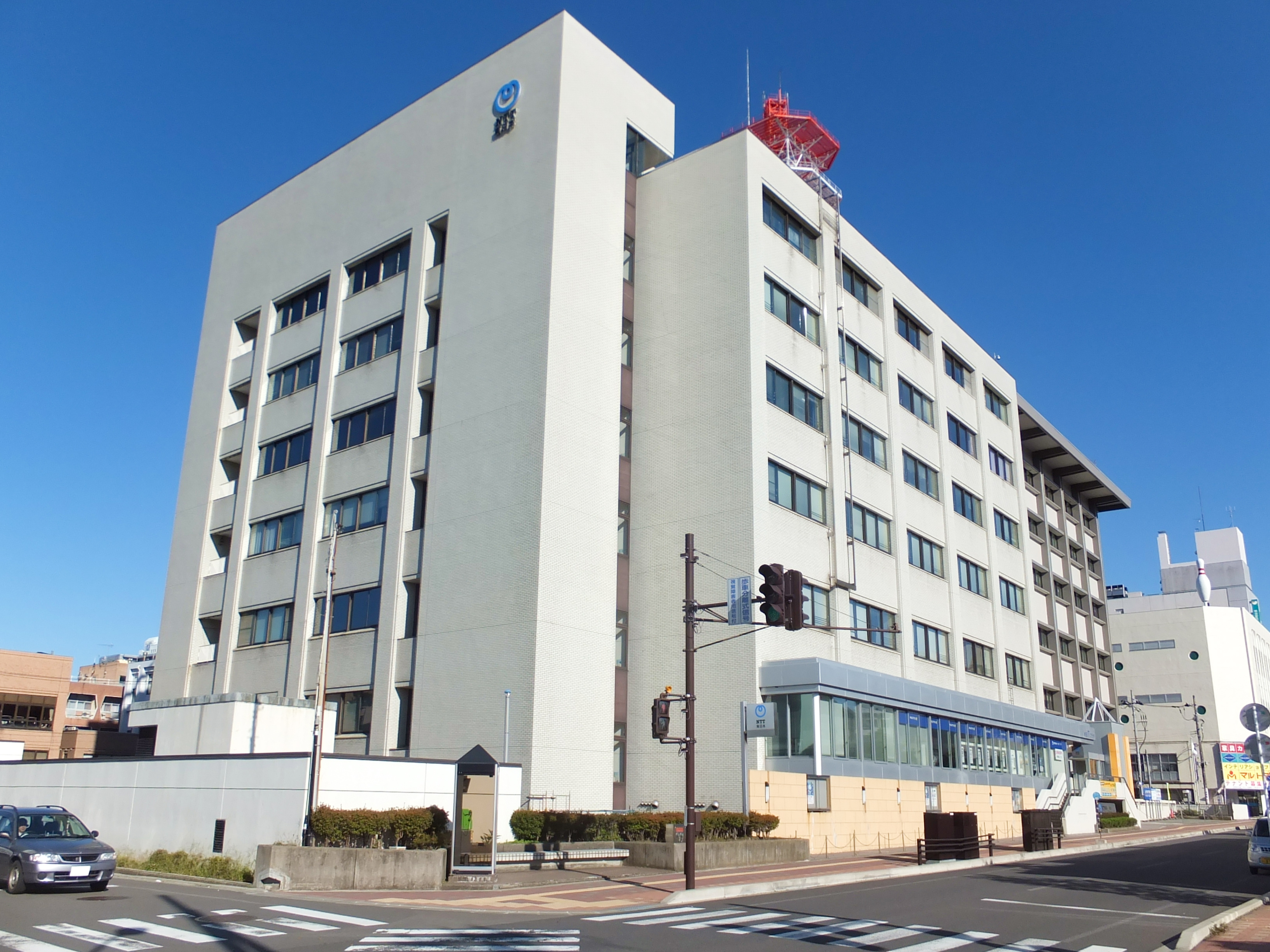 NTT東日本秋田ビル（秋田市中通）